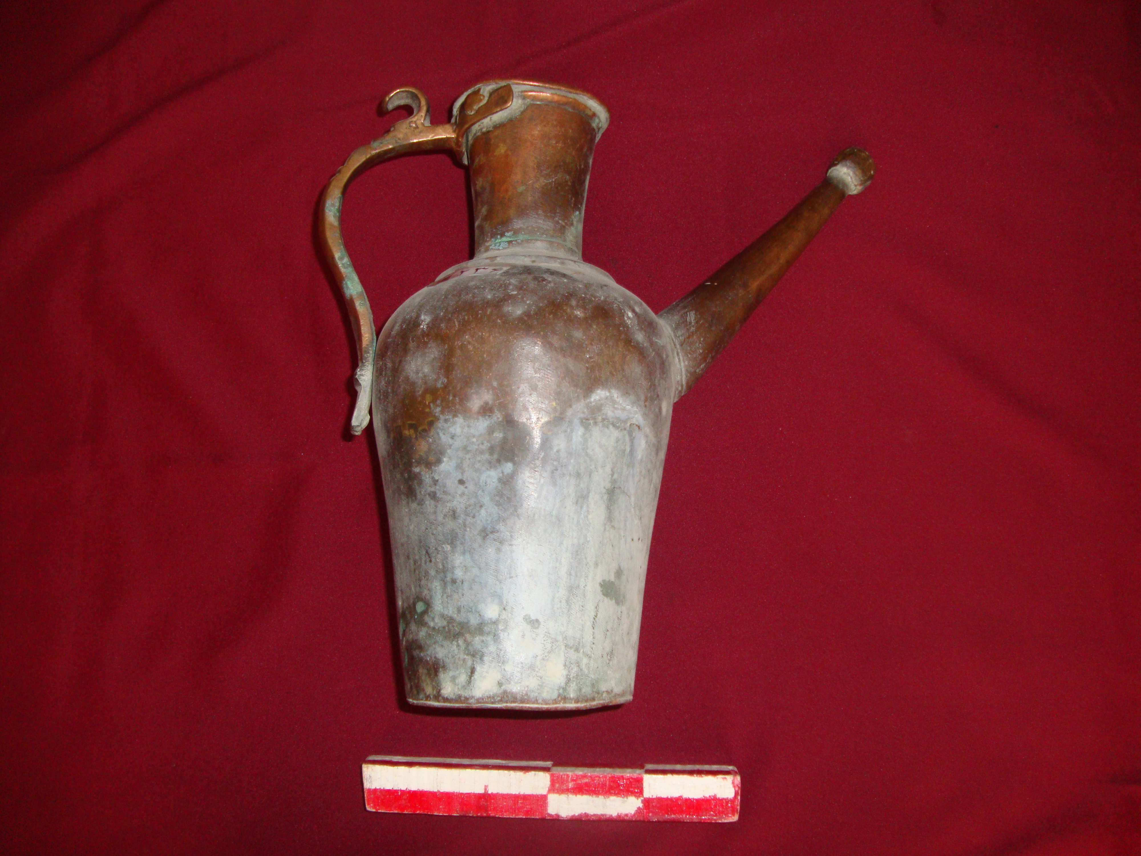 آفتابه مسی یکی از وسایل های بود که مردم روستای زالی از آن برای شستن دست به کارمی بردند. خراسان شمالی ، اسفراین ، بخش بام و صفی آباد ، روستای زالی